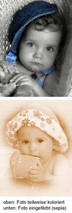 Kolorieren von Fotos – ganz und teilweise.